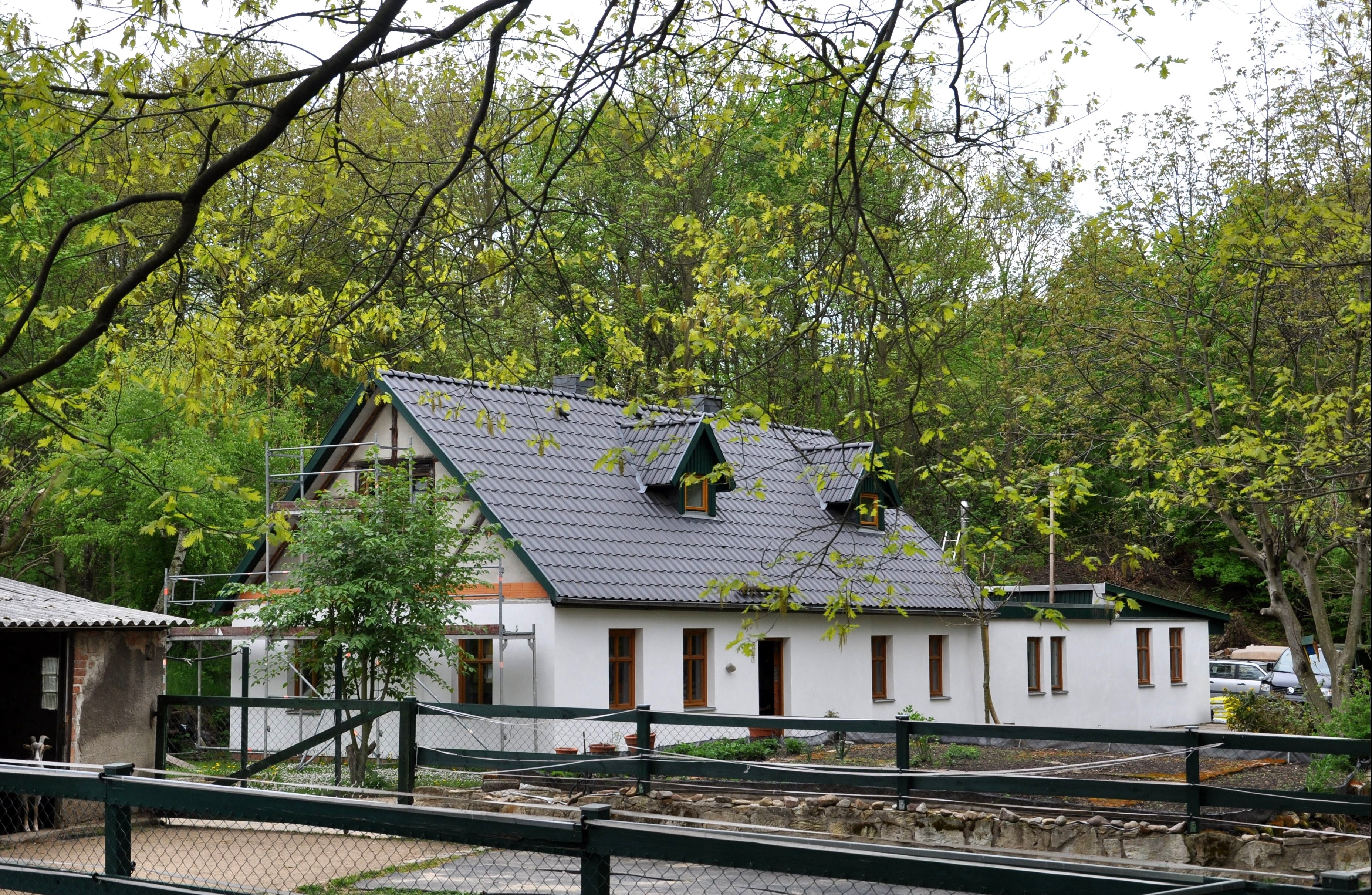 Huthaus des ehmaligen Neuhoffnungsschachtes am Windberg bei Freital